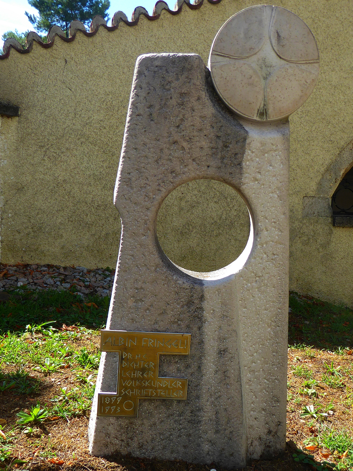 Grabstein von Albin Fringeli 1899–1993 Dr.phil.h.c., Mundartlyriker Lehrer, Volkskundler, Schriftsteller, Gründer und Mitautor des Jahres- und Heimatbuches "Dr Schwarzbueb" neben dem Heimatmuseum des Schwarzbubenlandes in Dornach, Solothurn.